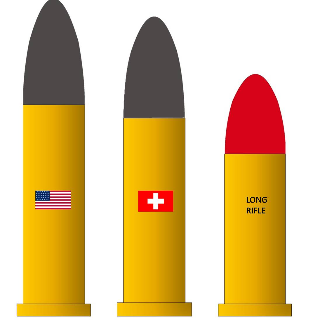 Comparación entre los cartuchos .22 Extra Long norteaericanp (izquierda), .22 Extra Long suizo (centro) y .22 Long Rifle (derecha), dibujo hecho con el uso de programa Corel Draw, banderas tomadas de Wikipedia.